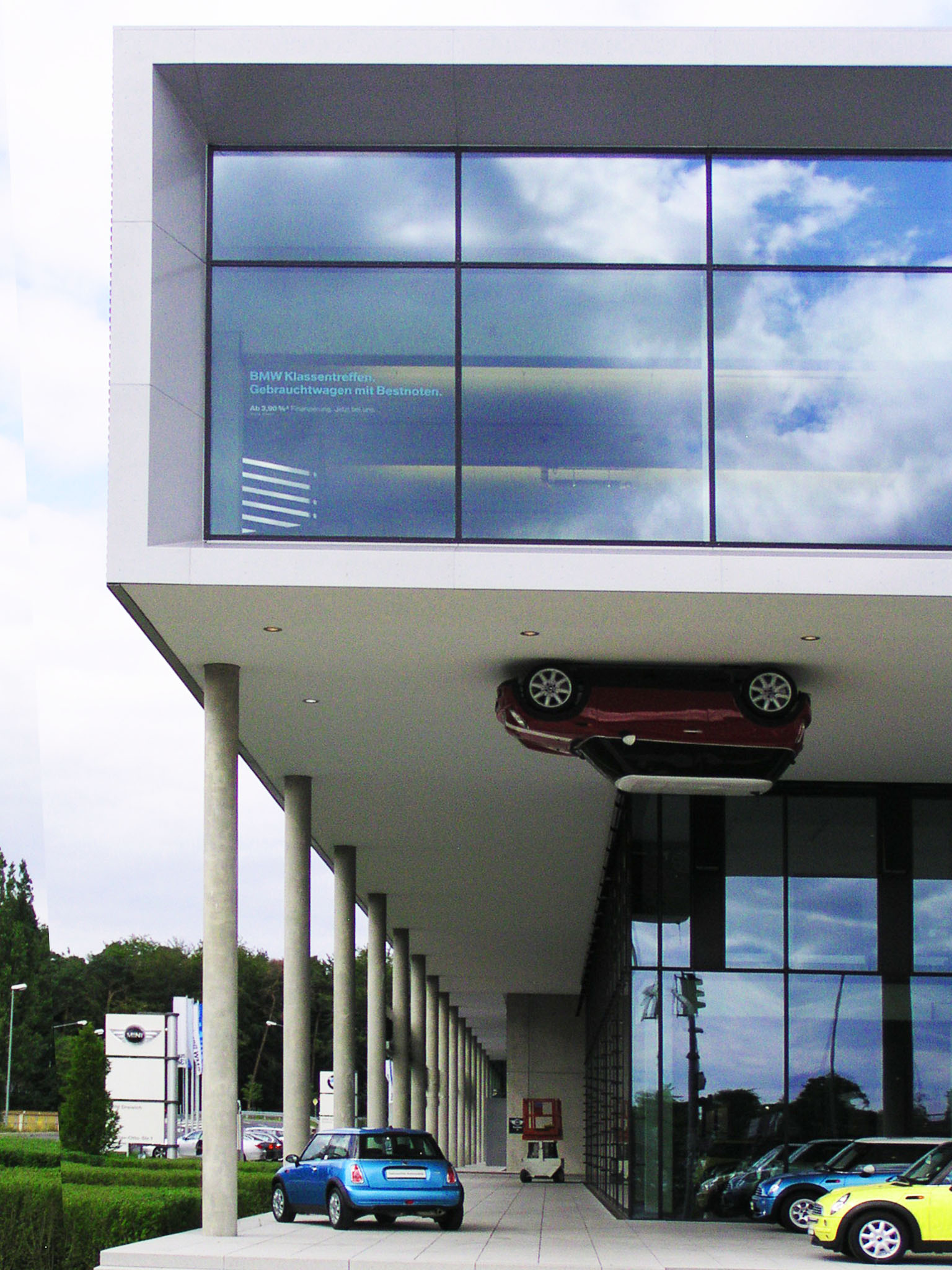 Außenansicht, BMW Dreieich